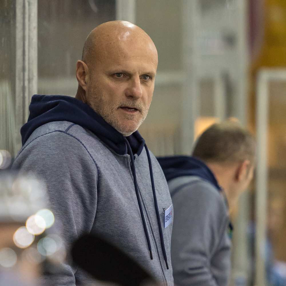 Erste Bank Eishockey Liga - UPC Vienna Capitals vs SAPA Fehervar AV19 am 14. Oktober 2016. Bild zeigt Headcoach Benoît Laporte.